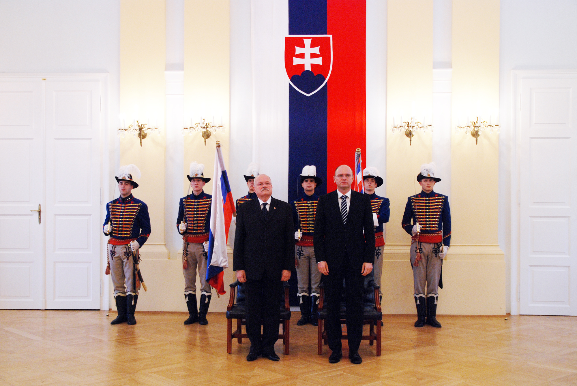 Ivan Gašparovič - prezident SR, Richard Sulík - predseda Národnej rady Slovenskej republiky